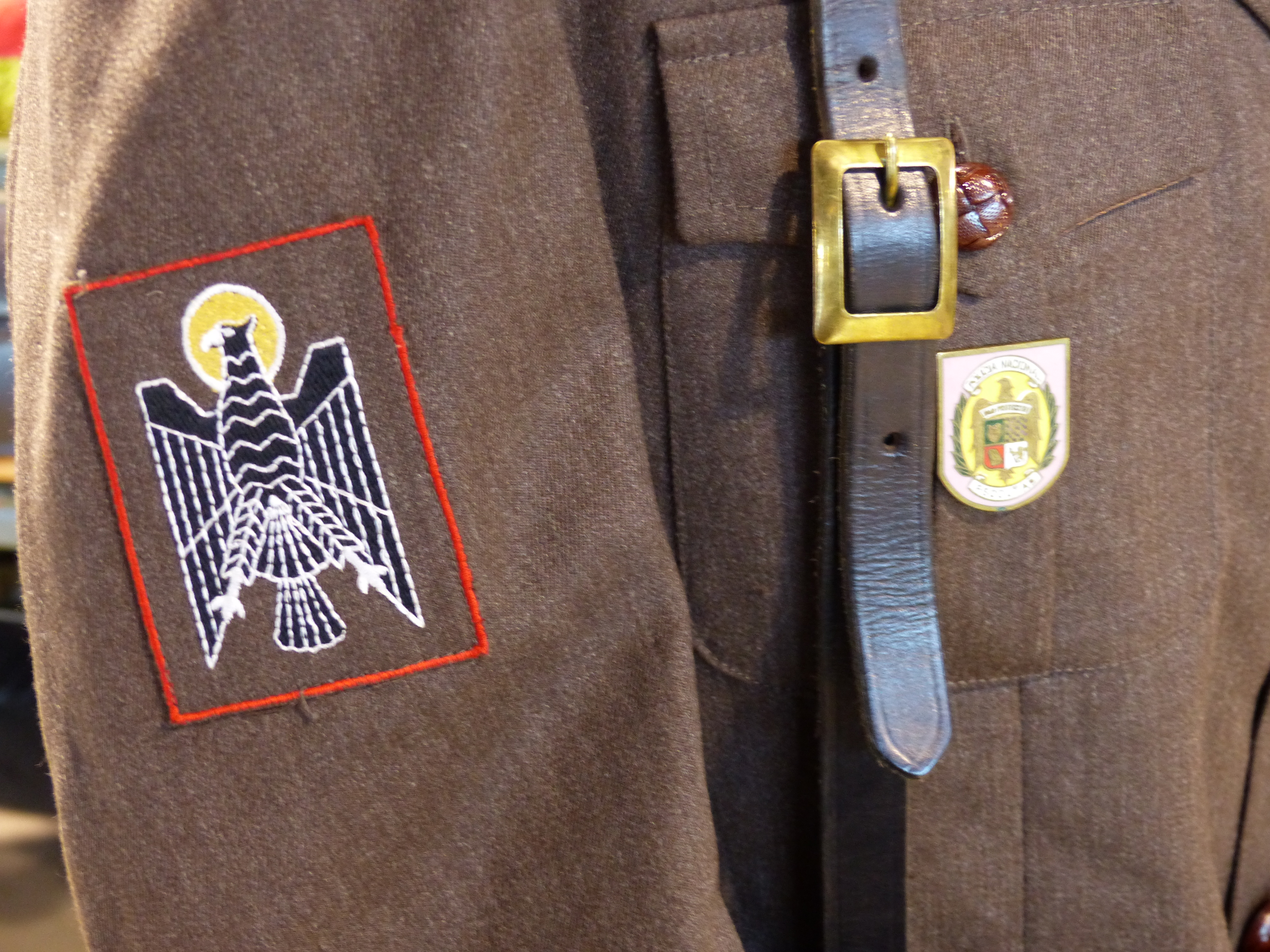 Uniforme de la policía. Época de la Transición.